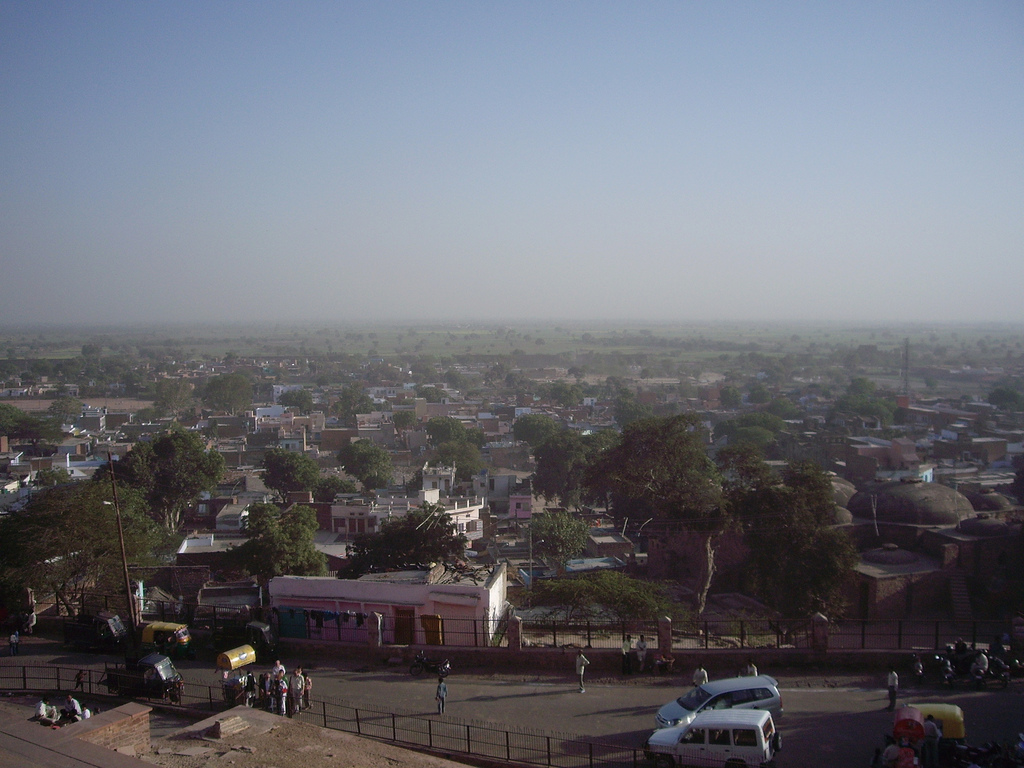 India (2007)